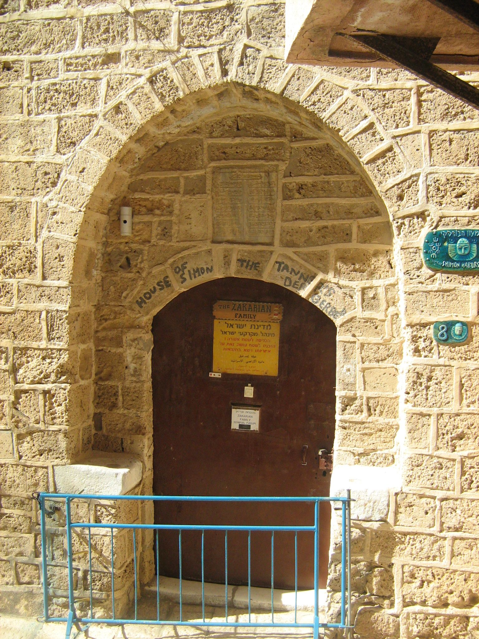 בית שמעון הבורסקאי ביפו